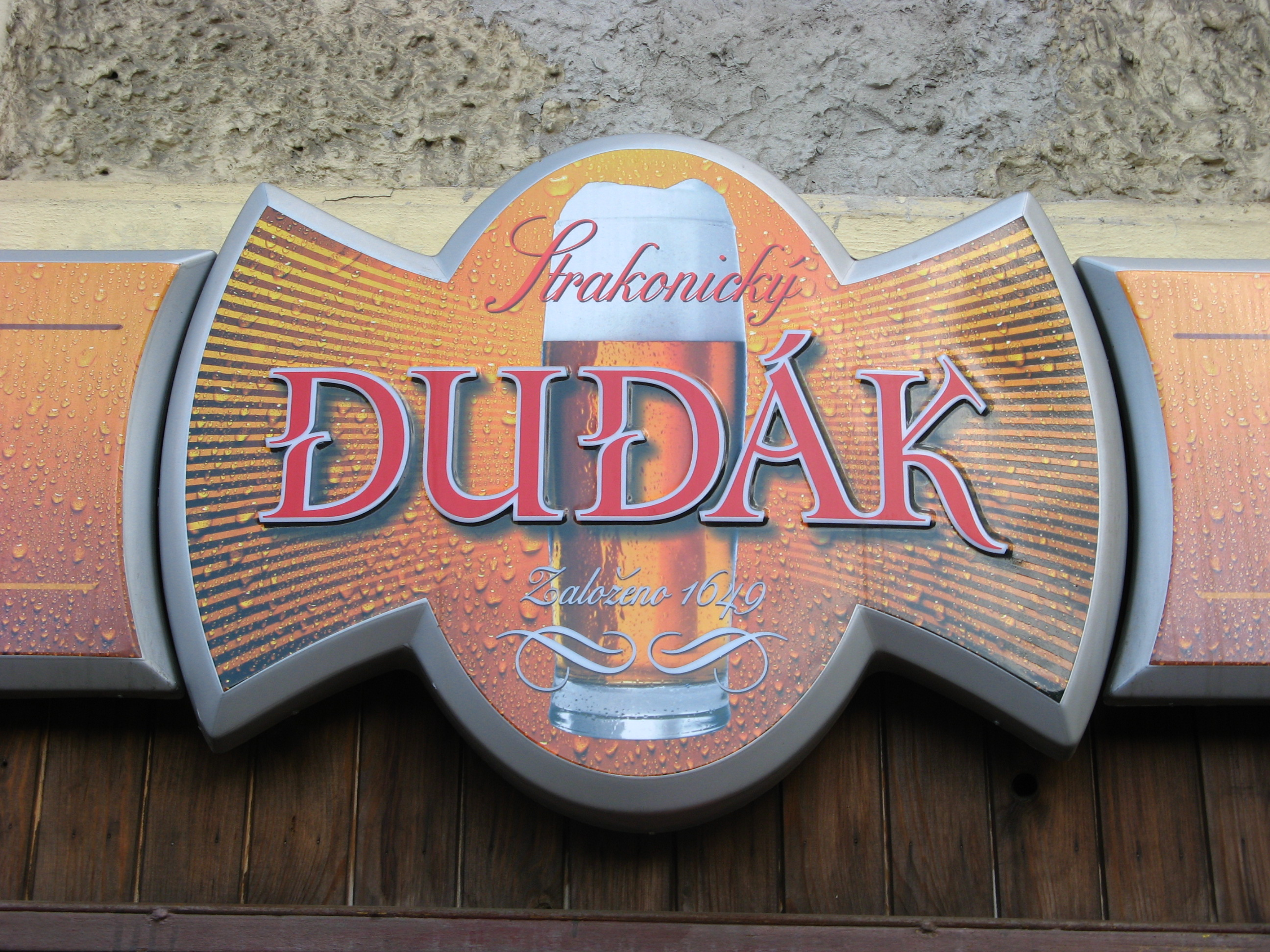 Pivovar Strakonice, Dudák - cedule